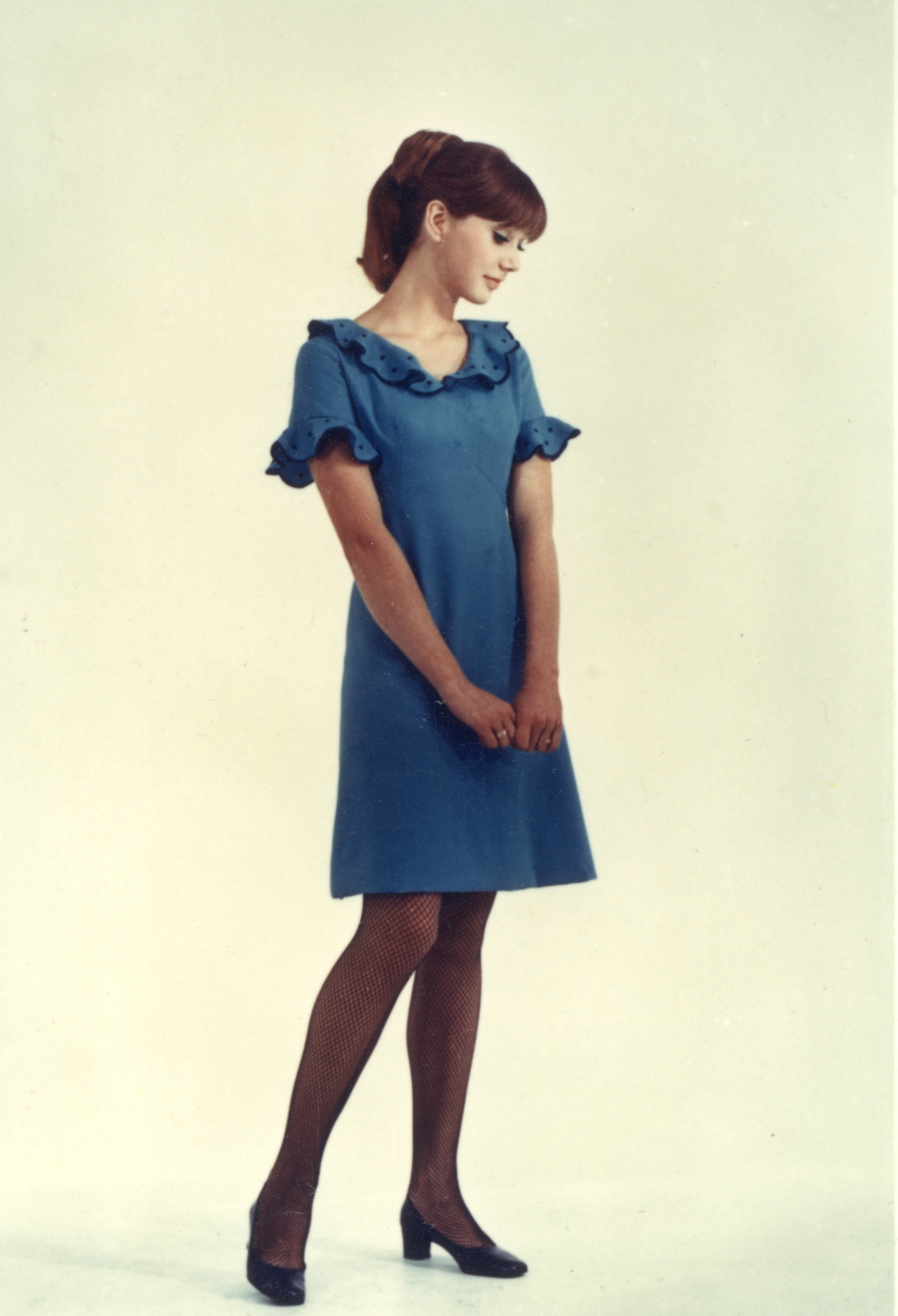 1968 fue el año de la renovación total con este diseño de Manuel Pertegaz. Este vestido, color turquesa y con reminiscencias andaluzas fue el elegido para el servicio de a bordo de Iberia. 1968 saw a total overhaul with this design by Manuel Pertegaz. This turquoise dress with Andalusian overtones was created for female cabin crew of Iberia. 1968 fût l'année du changement total avec cette création de Manuel Pertefaz. Cette robe couleur turquoise aux allures andalouses fût créée pour les hôtesses de l'air d'Iberia. Il 1968 fu l'anno di completa ristrutturazione, con questo disegno di Manuel Pertegaz. Questo abito turchese dal sapore andaluso venne scelto per servire a bordo. 1968 foi o ano da completa reestruturação dos uniformes, através do desenho do estilista Manuel Pertegaz. Este vestido turquesa foi criado para as comissárias de bordo que faziam o atendimento durante o voo. 1968 war das Jahr in dem die Uniform komplett neu gestaltet wurde. Manuel Pertegaz machte dieses Design in türkisem Ton und mit andalusischem Touch, für die weiblich Bordbesatzung von Iberia.